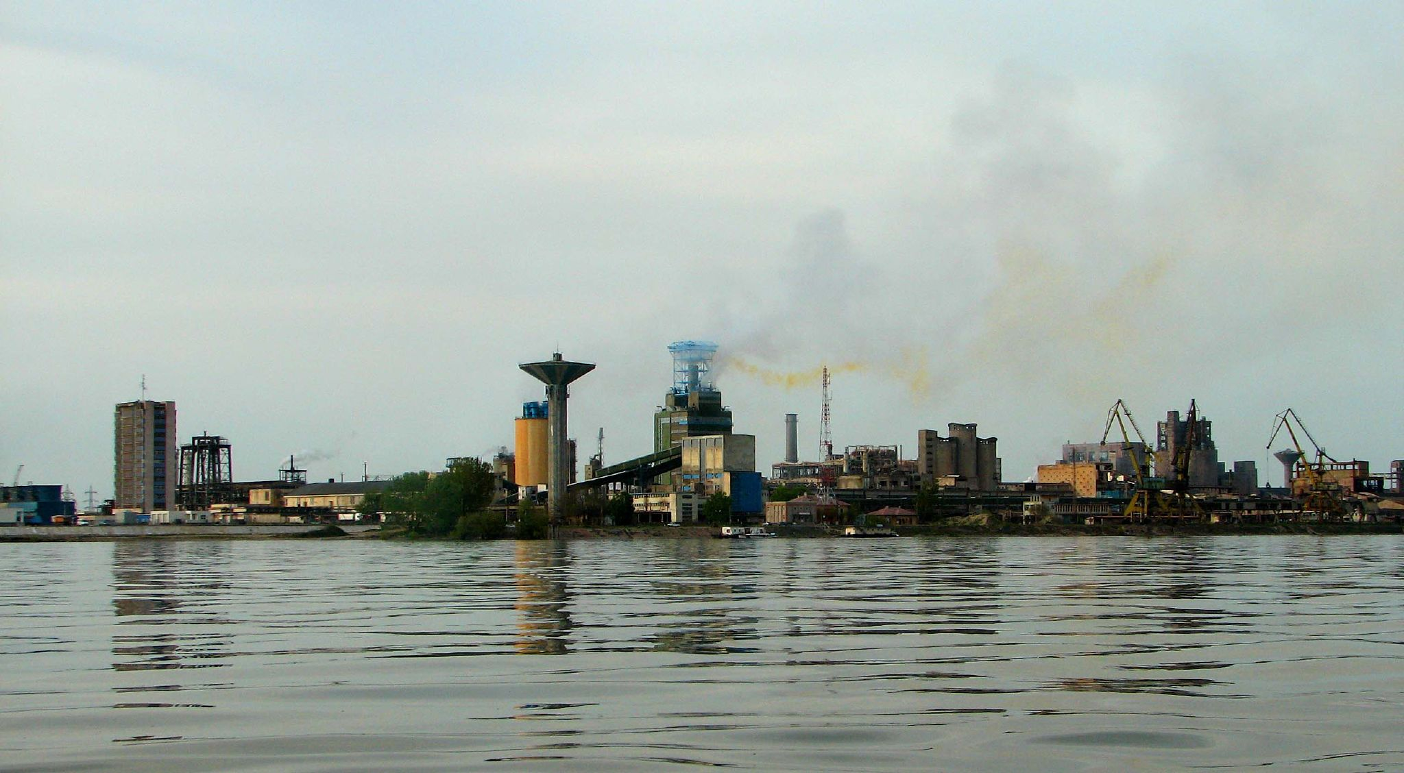 Nikopol